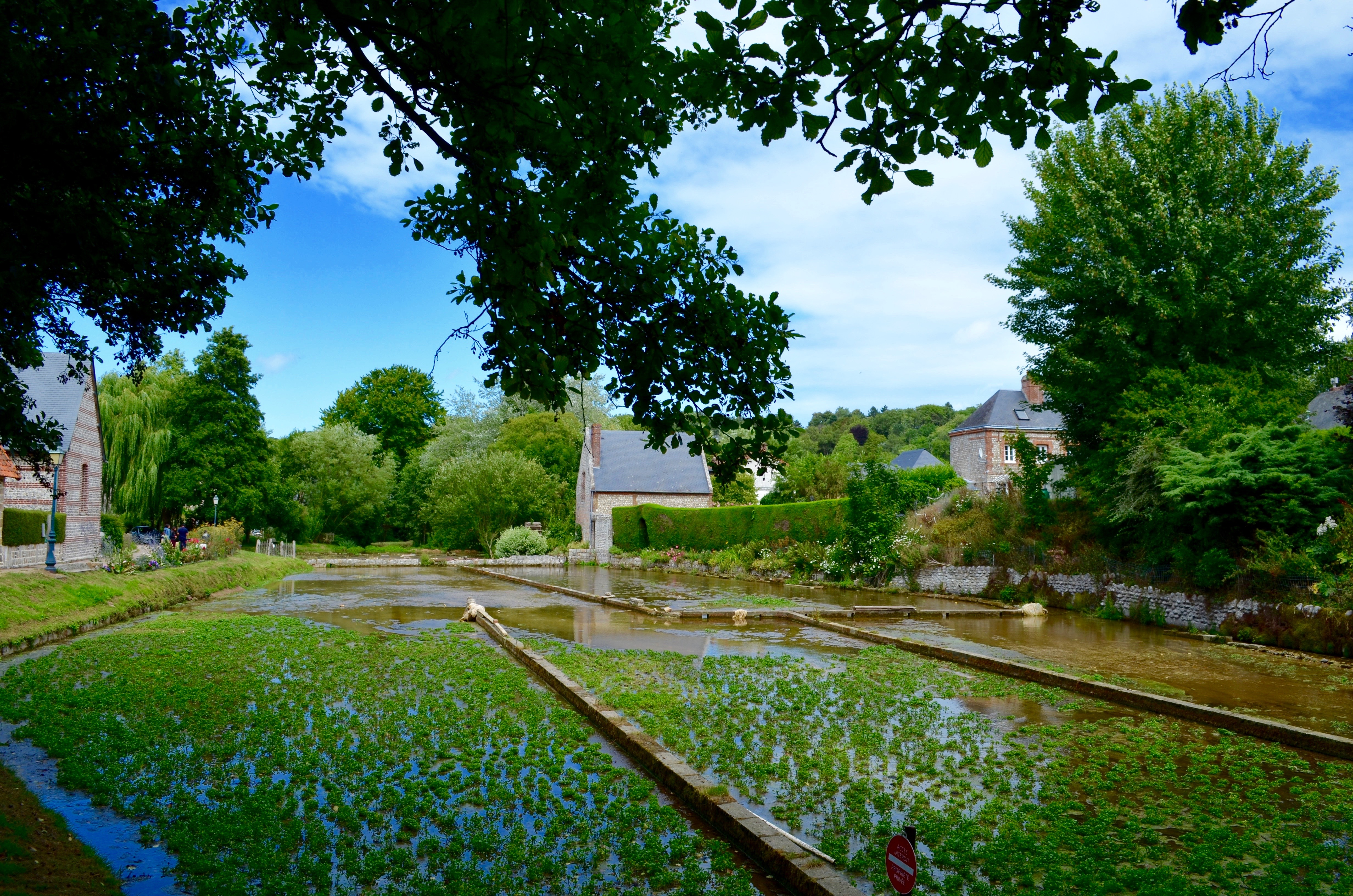 Vue sur les cressonnières